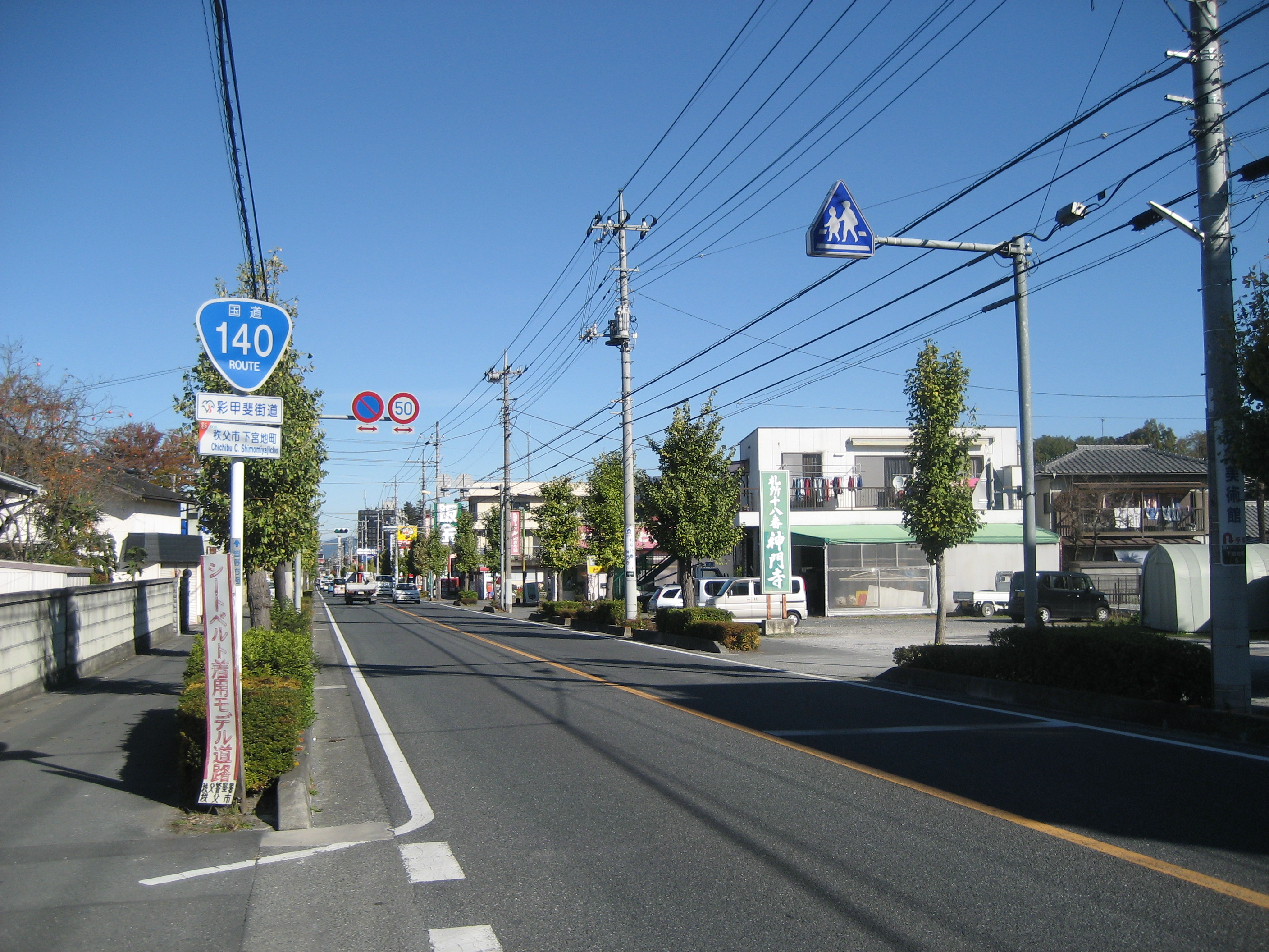 国道140号線埼玉県秩父市下宮地町付近